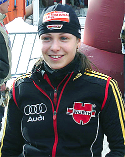 Magdalena Neuner, antholz, 2006